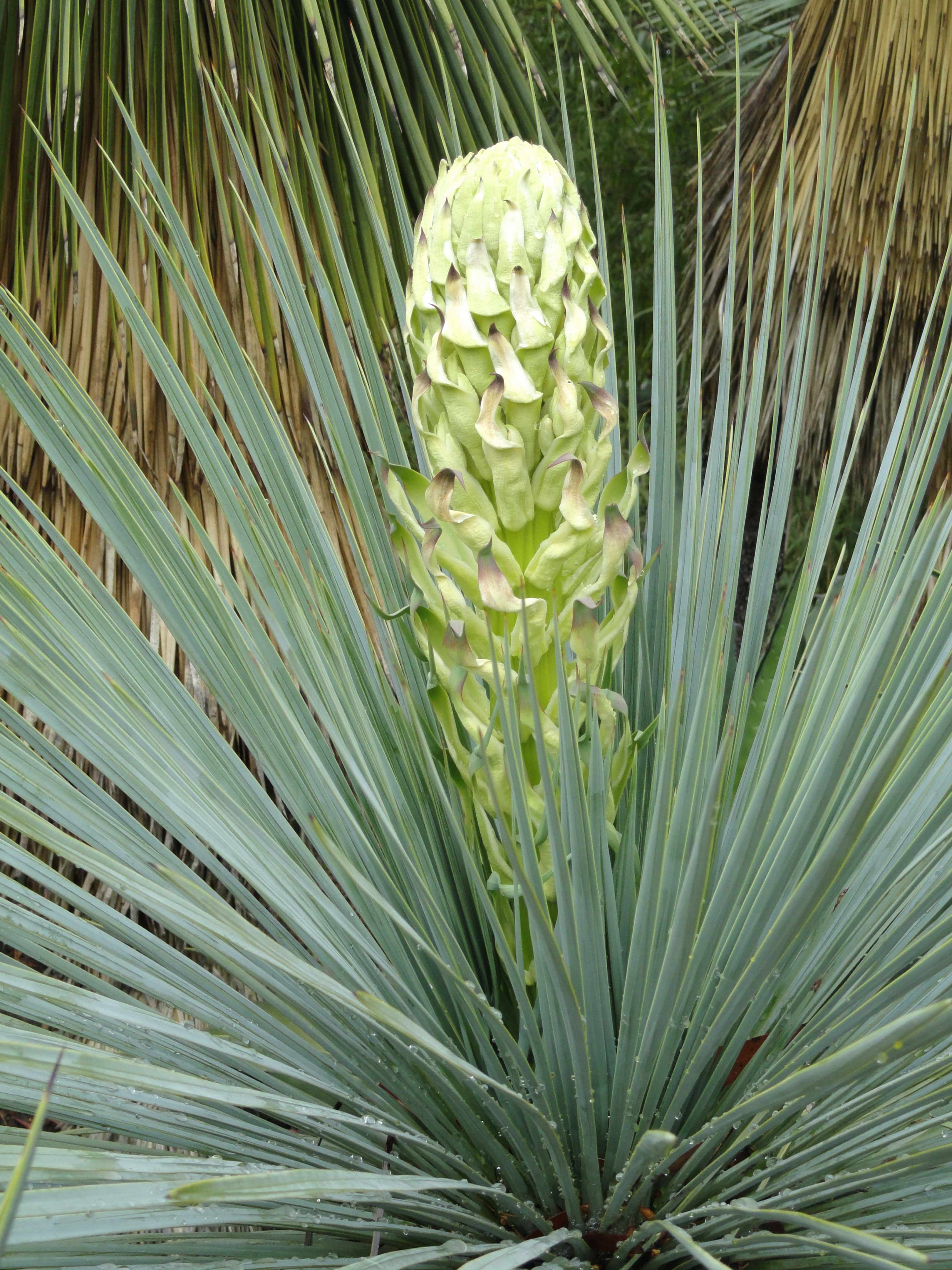 Yucca linearifolia specimen in the Jardin d'oiseaux tropicaux, La Londe-les-Maures, France.